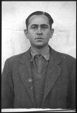 Friedrich Wilhelm Ruppert (* 2. Februar 1905 in Frankenthal (Pfalz); † 28. Mai 1946 in Landsberg am Lech) war ein deutscher SS-Obersturmführer (1943) und Erster Schutzhaftlagerführer im KZ Dachau sowie auch im KZ Majdanek eingesetzt. Er wurde im Dachau-Hauptprozess zum Tode verurteilt und hingerichtet.